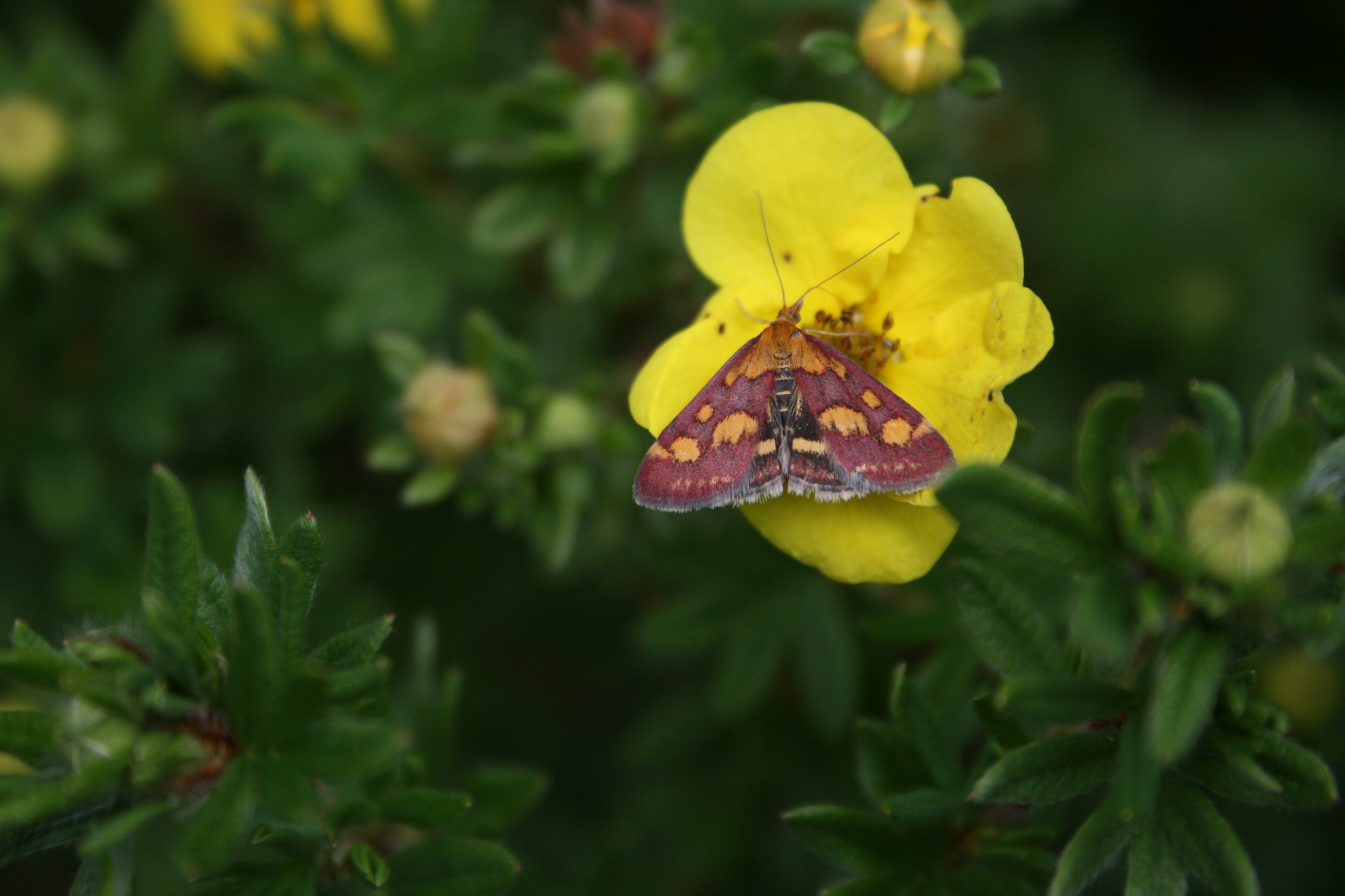 Purpurroter Zünsler (Pyrausta purpuralis) auf Fünffingerstrauch-Blüte (Dasiphora fruticosa), Eitorf, Deutschland